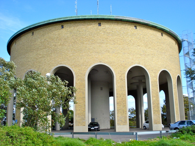 Vattetornet Guldhedstornet i Guldheden i Göteborg